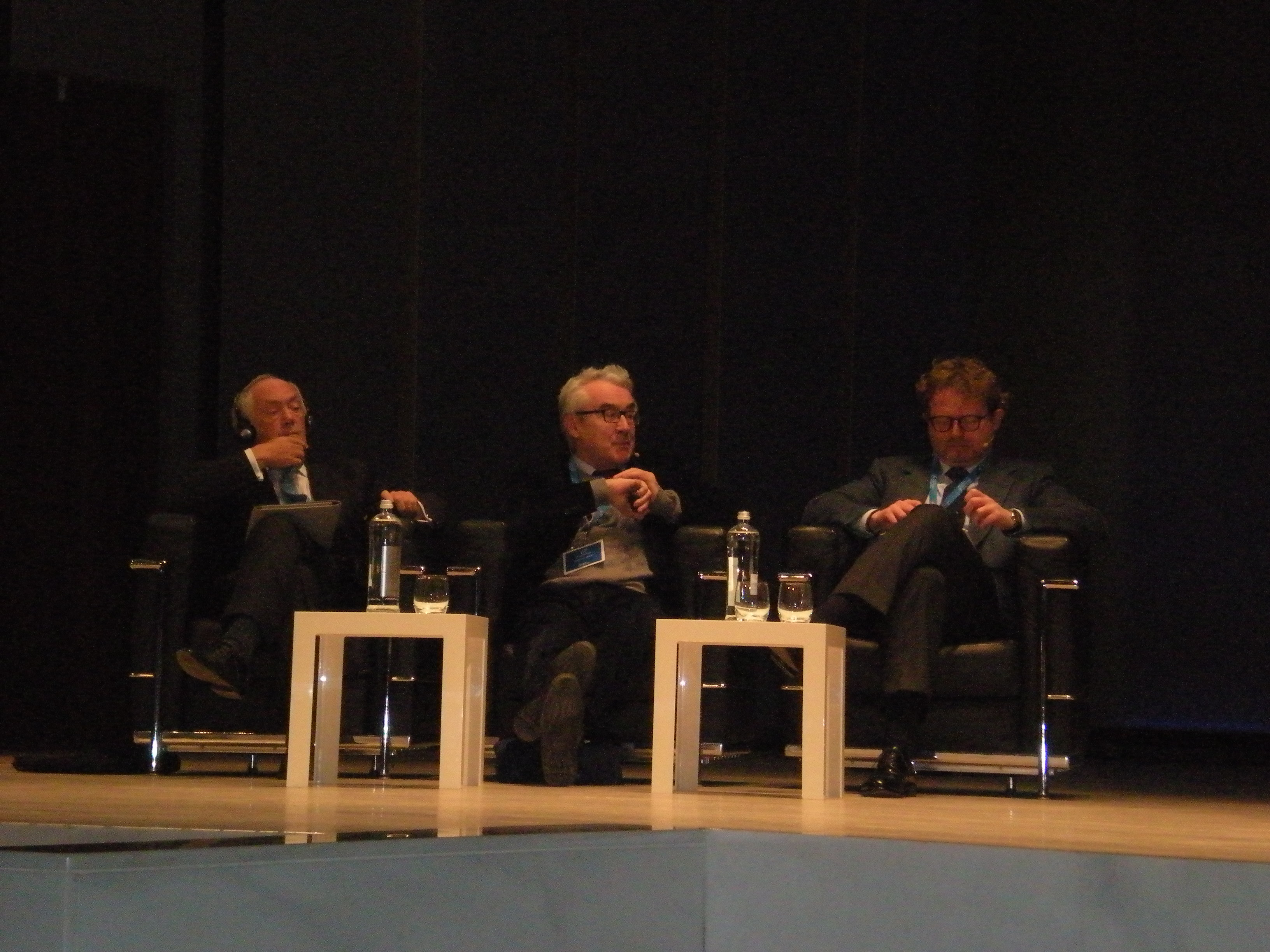 Peter Atkins (il primo da sinistra) fra Giulio Giorello e Giuseppe Testa - Conferenza nondiale Science for Peace - Università Bocconi, Aula Magna, Milano 16 novemnre 2013